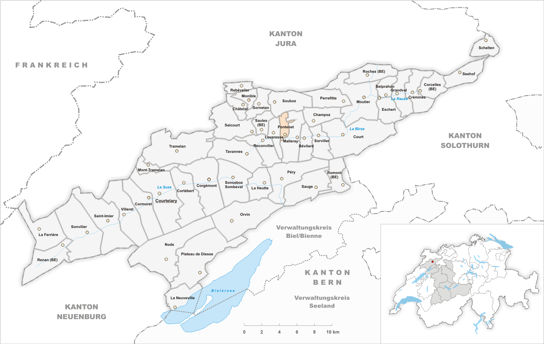 Municipality Pontenet